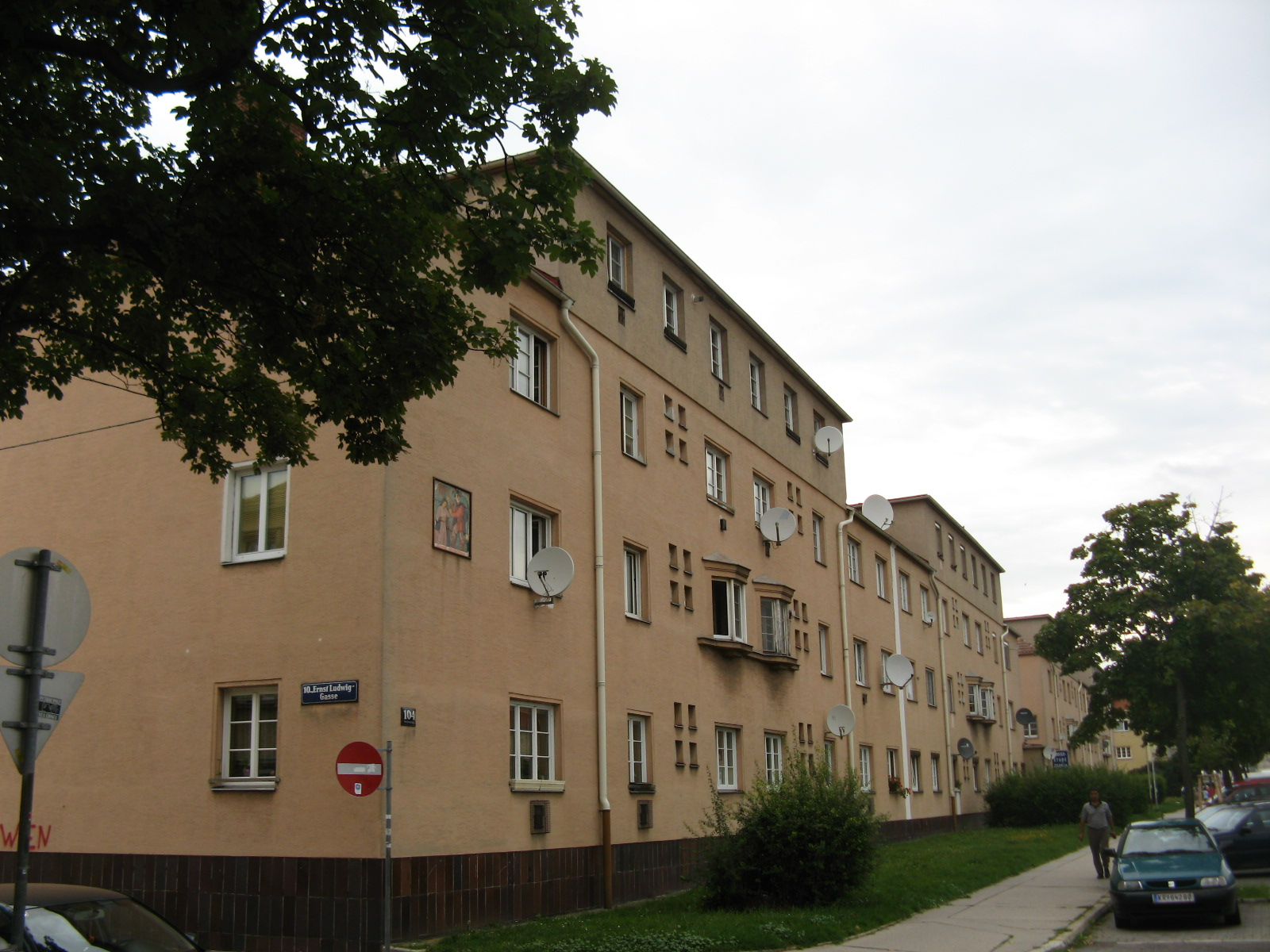 Johann-Mithlinger-Siedlung (1929) von Karl Schmalhofer, Raxstraße 7-27, Wien-Favoriten